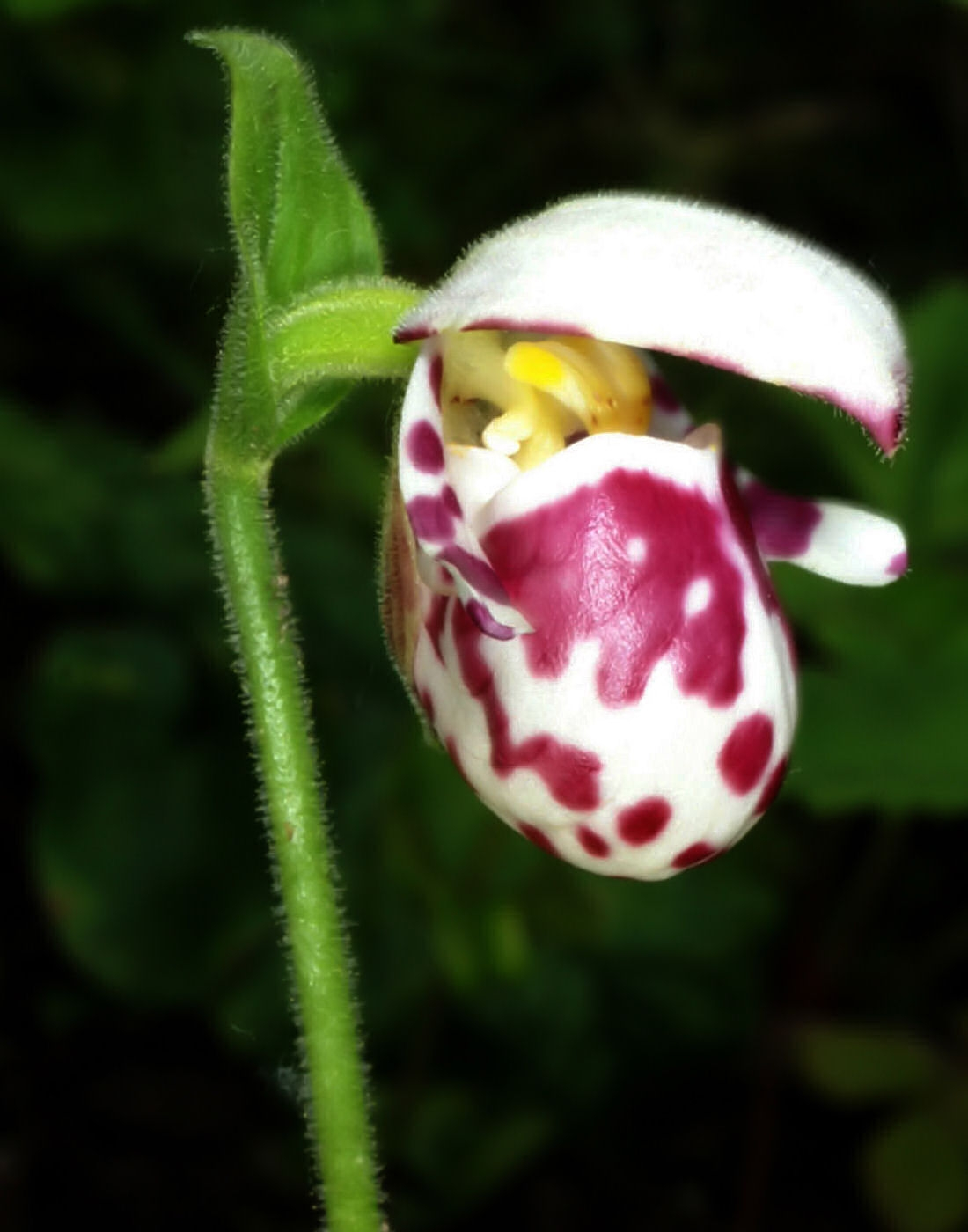 Cypripedium guttatum